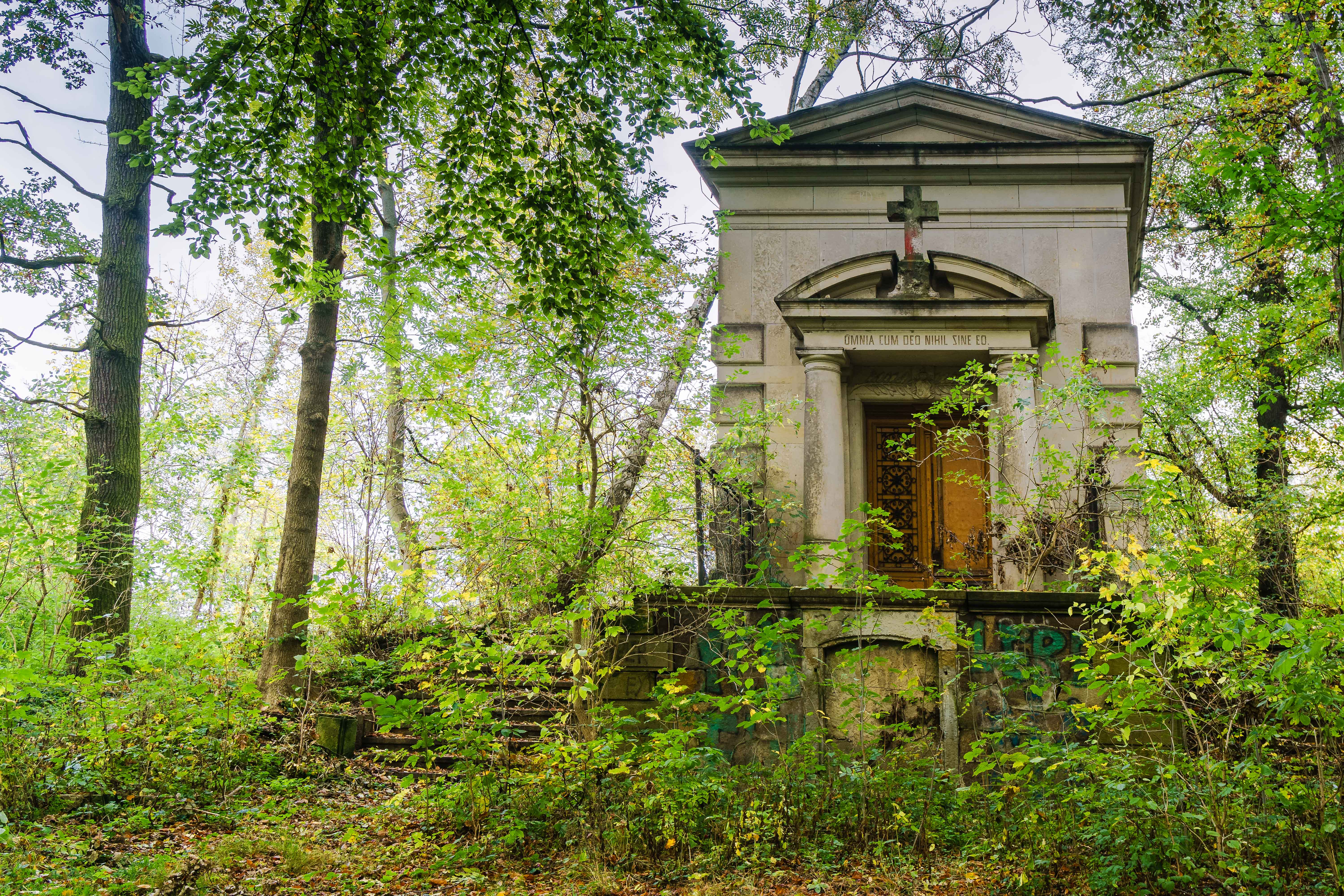 Familiengruft der Rittergutsbesitzer von Byern mit Treppenanlage, Waldweg in Liebschützberg OT Borna Text: OMNIA CUM DEO NIHIL SINE EO.